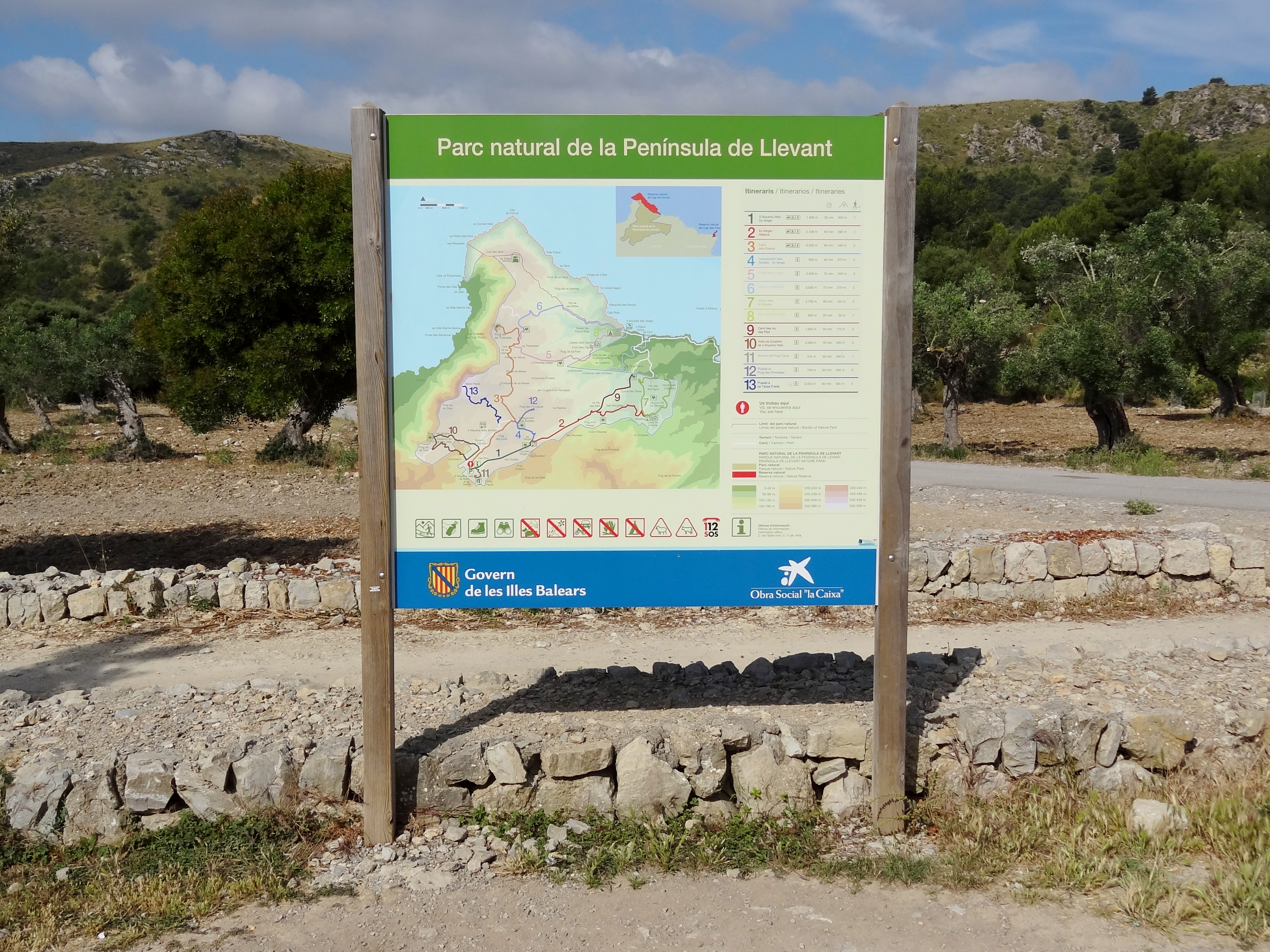 Informationstafel am Parkplatz von s’Alqueria Vella de Baix, Gemeinde Artà, Mallorca, Spanien